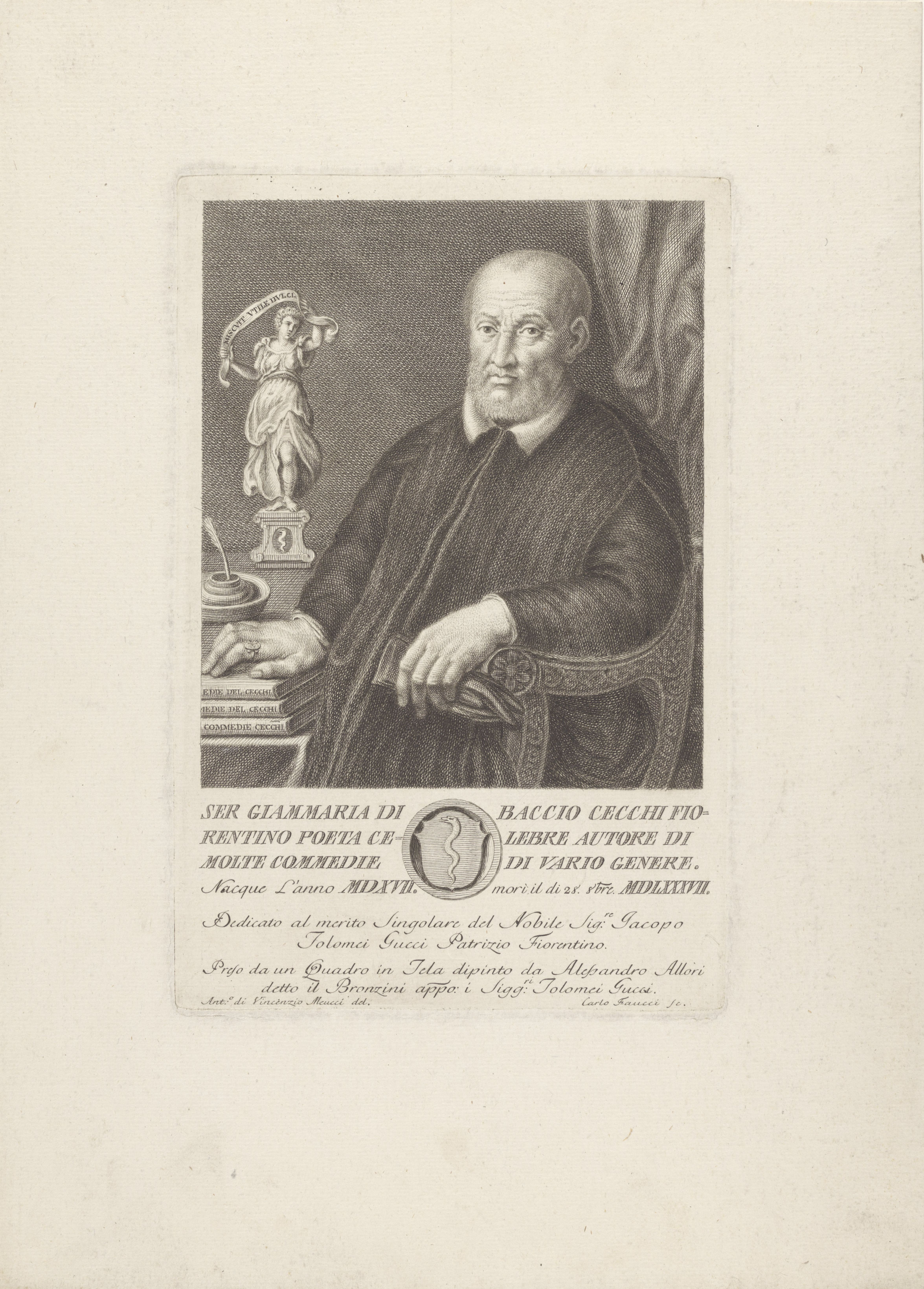 IdentificatieTitel(s): Portret van dichter Giovanni Maria CecchiPortretten van beroemde Italianen met wapenschild in ondermarge (serietitel)Objecttype: prent Objectnummer: RP-P-1909-4907Catalogusreferentie: LeBlanc 48Opschriften / Merken: verzamelaarsmerk, verso, gestempeld: Lugt 2228VervaardigingVervaardiger: prentmaker: Carlo Faucci (vermeld op object)naar tekening van: Antonio di Vincenzio Meucci (vermeld op object)naar schilderij van: Alessandro Allori (vermeld op object)opgedragen aan: Jacopo Tolomei Gucci (vermeld op object)Plaats vervaardiging: prentmaker: Italiënaar tekening van: Italiënaar schilderij van: Florenceopgedragen aan: FlorenceDatering: 1739 - 1784Fysieke kenmerken: etsMateriaal: papier Techniek: etsenAfmetingen: plaatrand: h 301 mm × b 200 mmToelichtingDeze prent maakt deel uit van een reeks portretprenten van onbekende omvang. De prenten zijn gemaakt door meedere prentmakers, onder Wie: Francesco Allegrini en Carlo en Raimondo Faucci.OnderwerpWat: historical personsportrait of a writerwriter, poet, authorWieGiovanni Maria CecchiVerwerving en rechtenVerwerving: aankoop 1905Copyright: Publiek domein